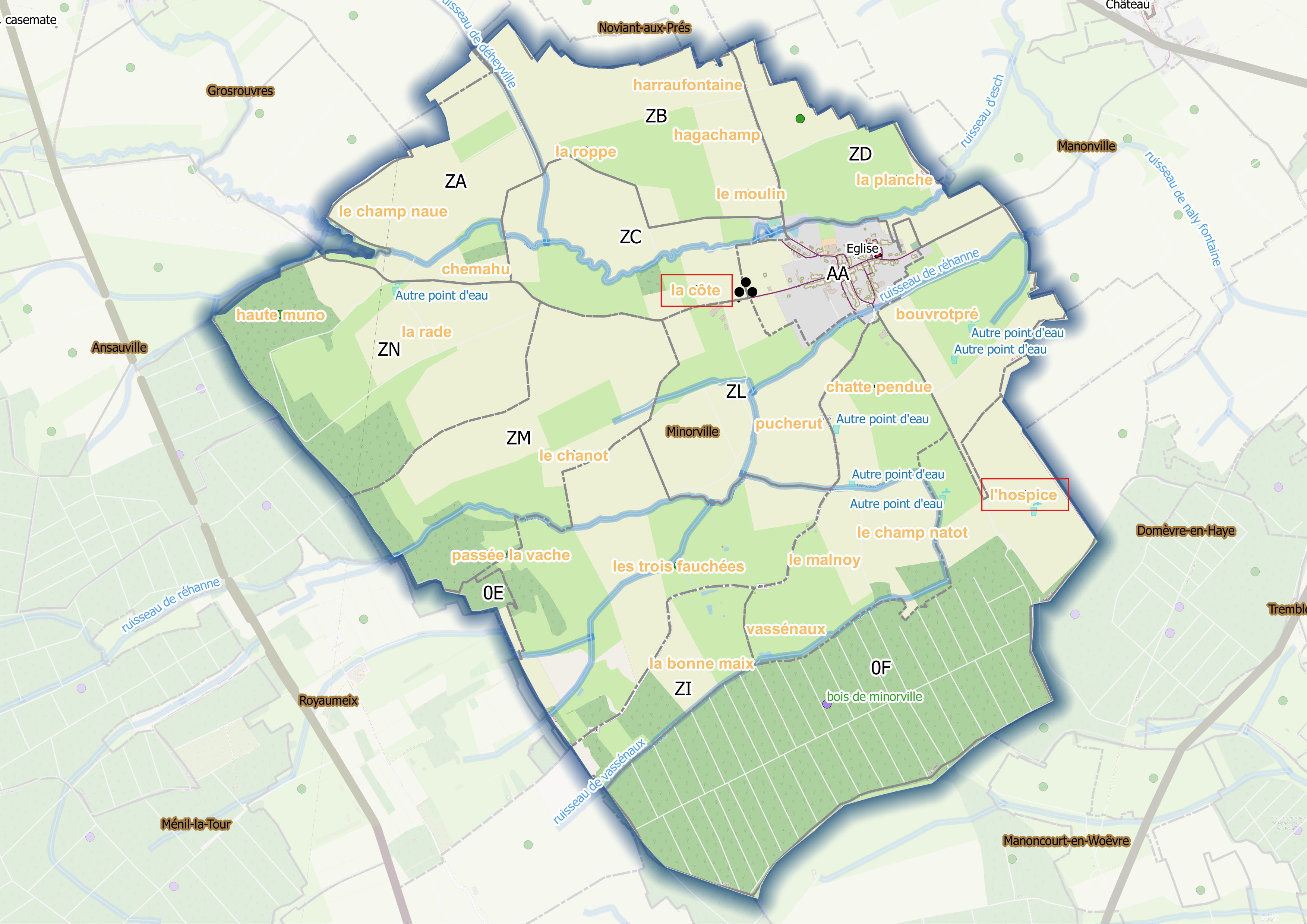 (Fig1) Minorville (ban communal) Osm et Qgis